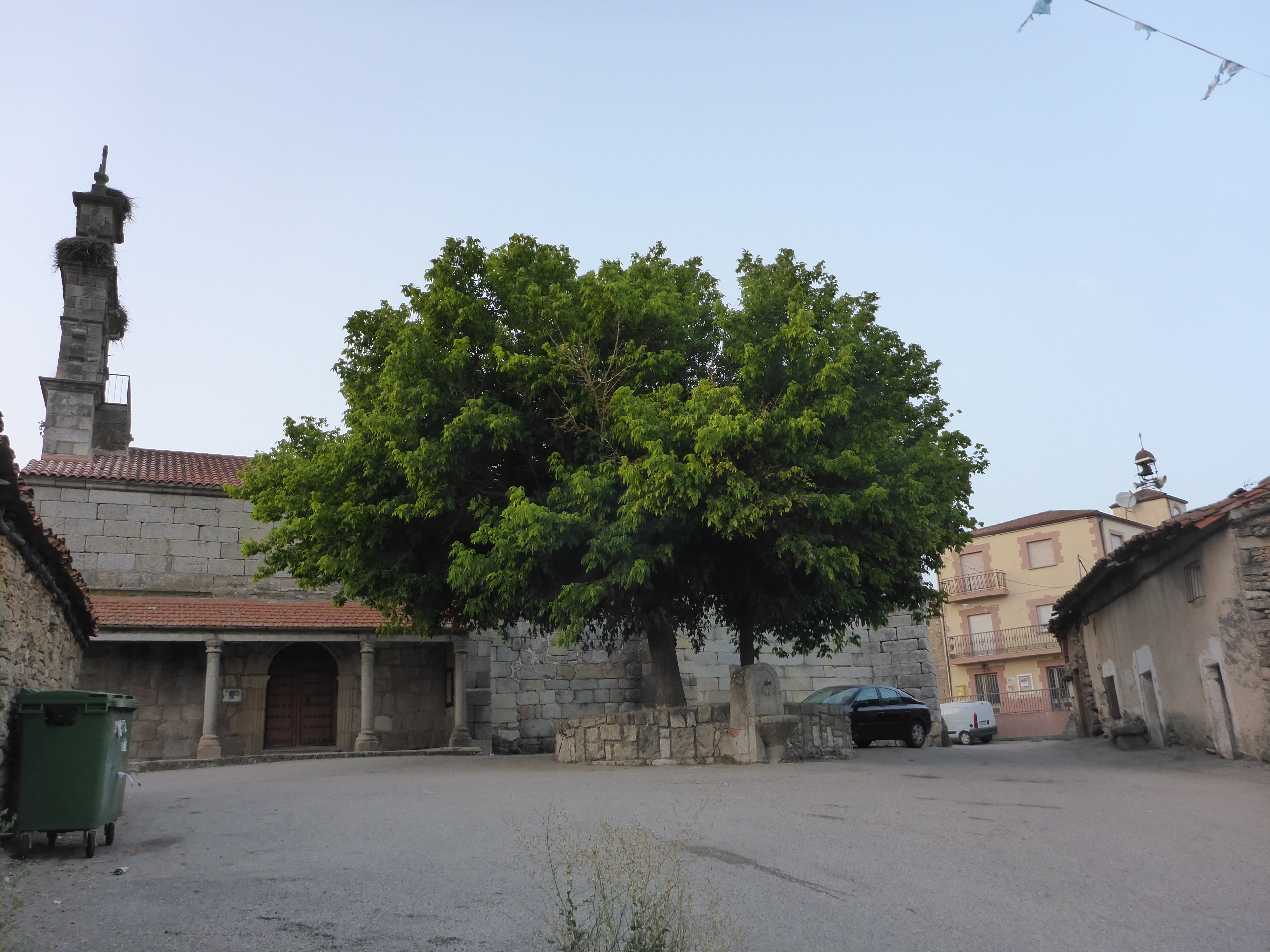 Cabeza del Caballo (Salamanca, España)